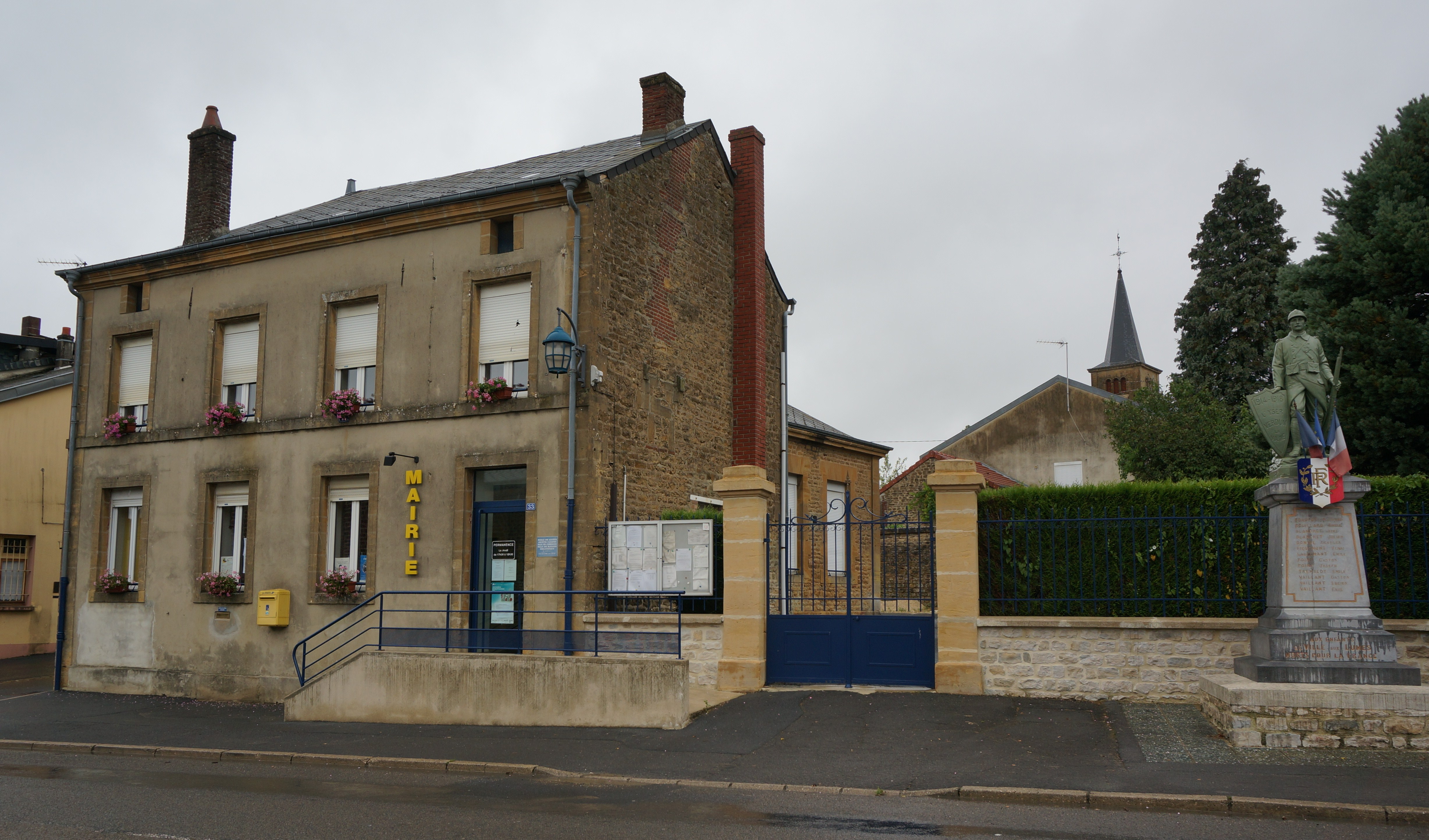 Vue de la Mairie et du monument aux morts.